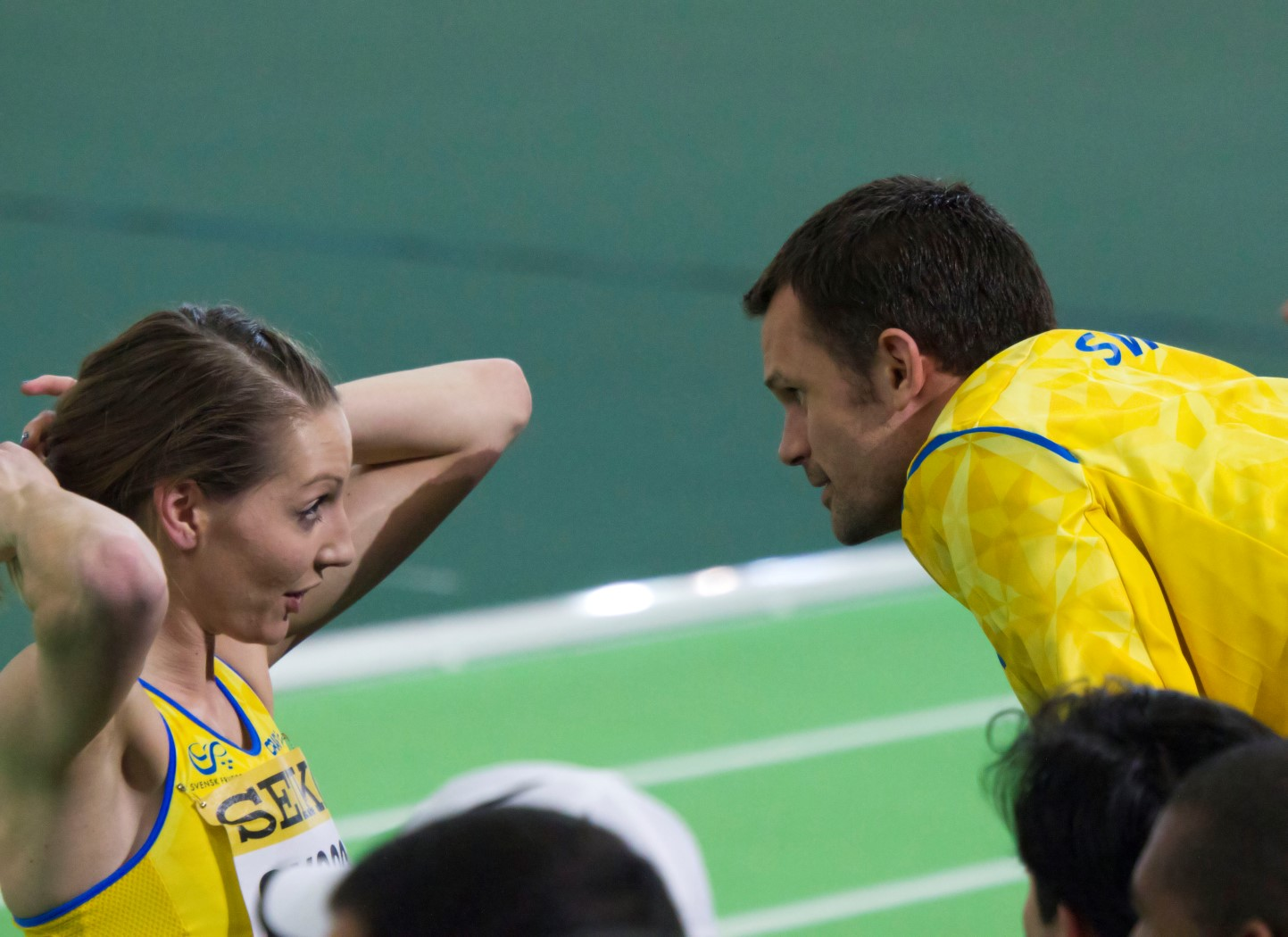 5136 skoog met stefan holm